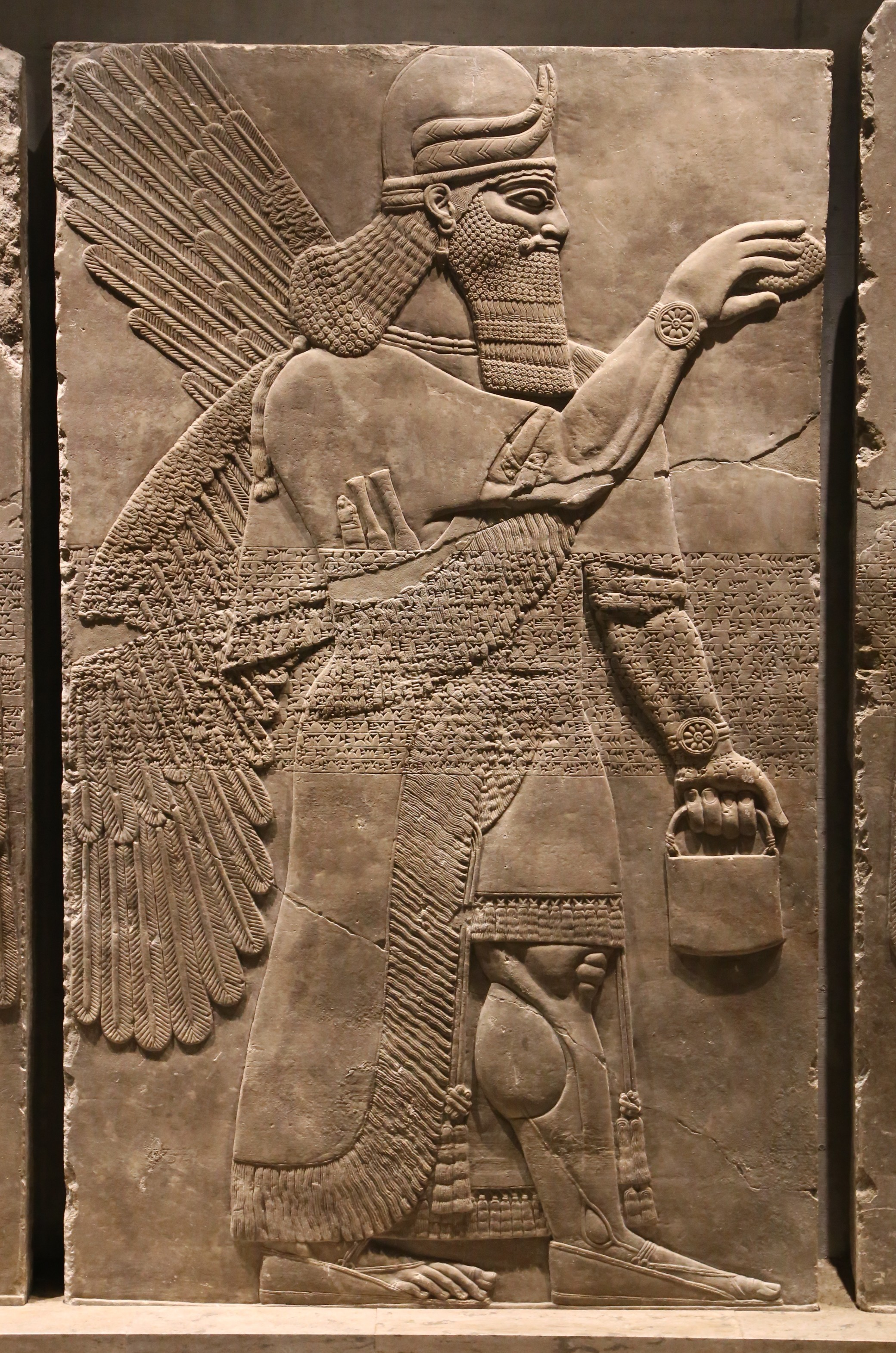 Geflügelte bärtige Genien mit verschiedenen Attributen, Nimrud, Nordwestpalast des Königs Assurnasirpal II., um 870 v. Chr., Mossulalabaster